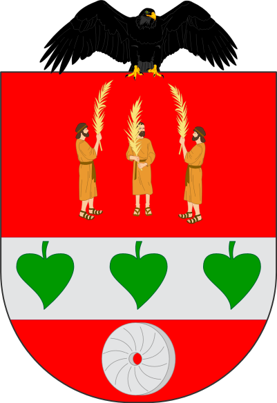 Ofizialki ezin da topatu Bolibarko armarria, baina irudietan hau ikusten da. Armarri moztua; lehengoa, gorria, eta bertan hiru gizon palma-adar eskuetan daude; bigarrena ere moztua, lehengoan, zilarrean, hiru hosto orlegi daude, bigarrenean, gorrian, zilarrezko errotarri bat dago. Ohorezkoan beltzezko hegazti harrapari bat dago